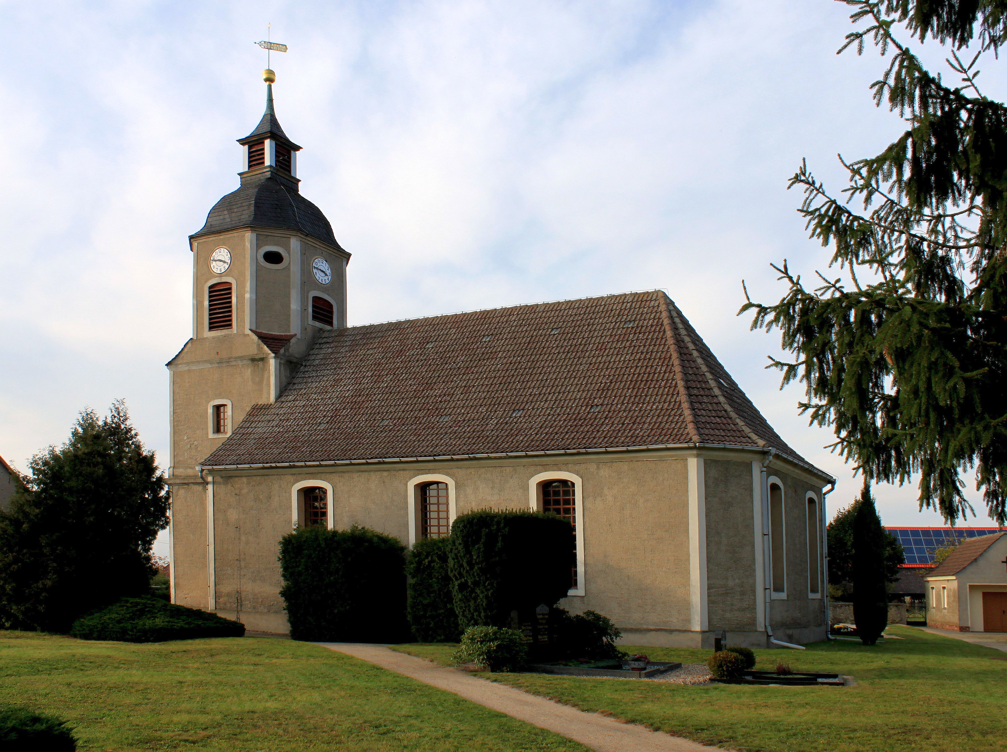 Kosilenzien